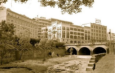 Vista del puente ortiz